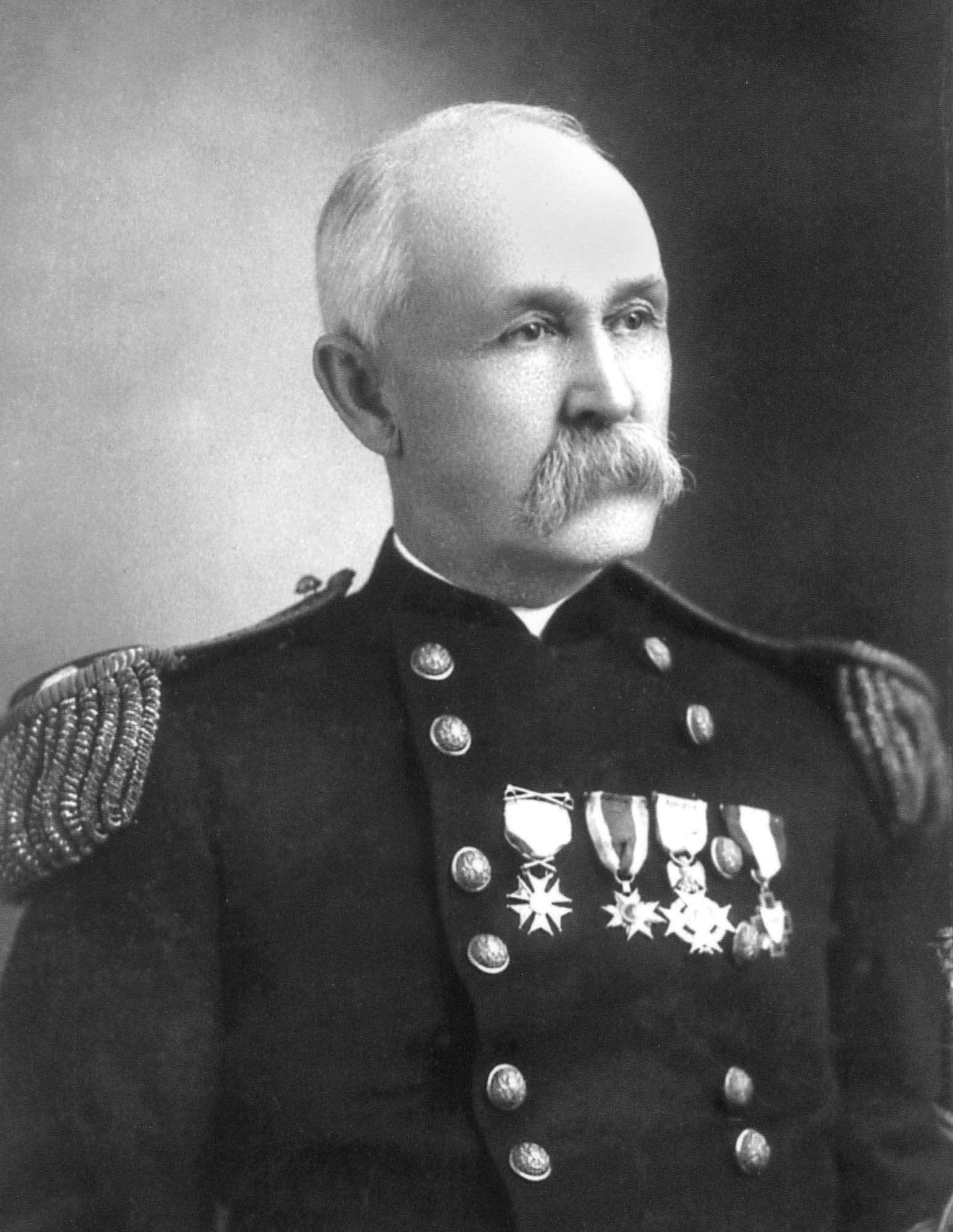 Brigadier General George Miller Sternberg